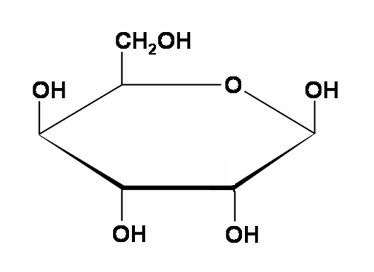 Representación de la β-D-Gulopiranosa